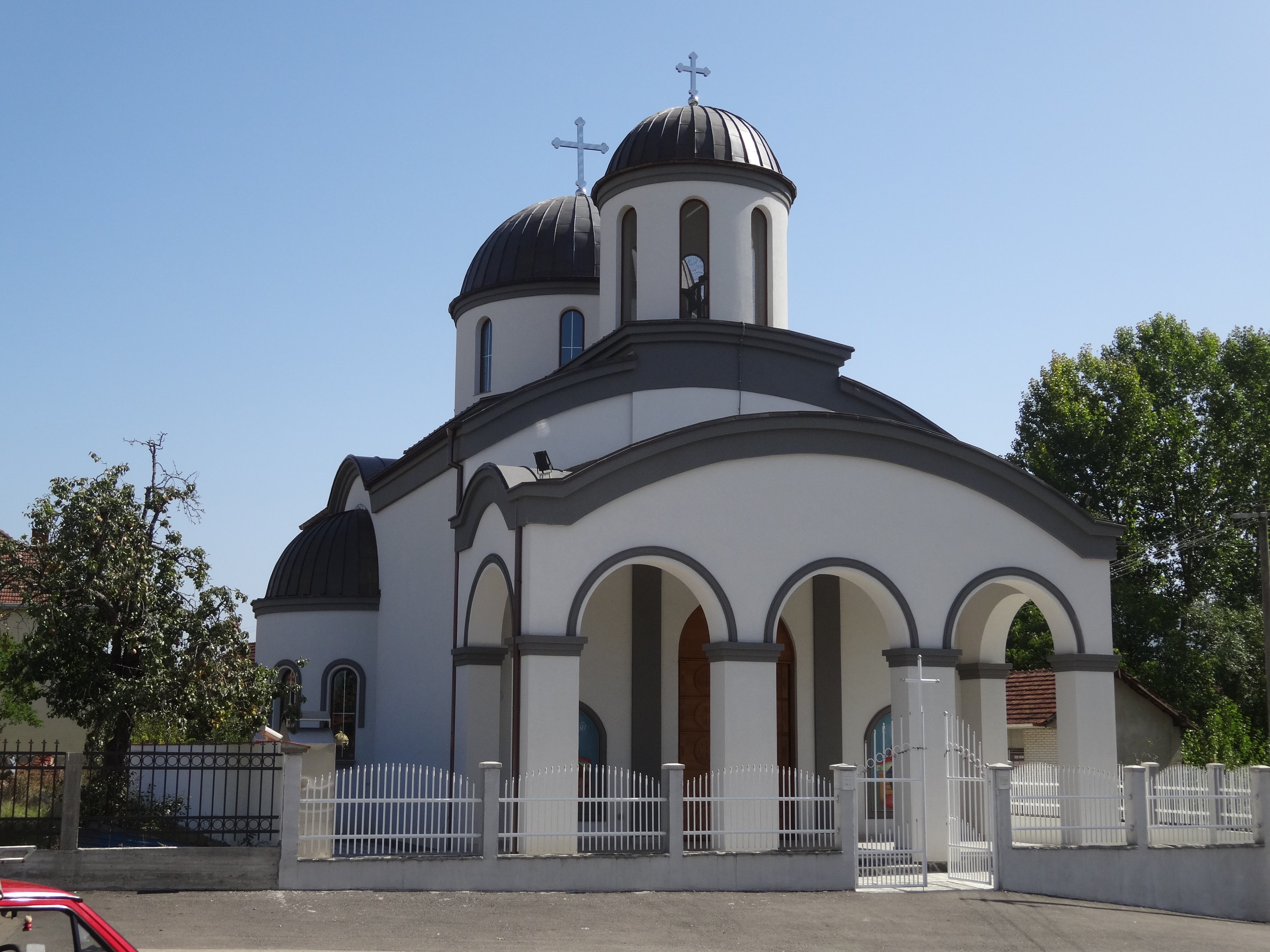 Beli Potok, Leskovac